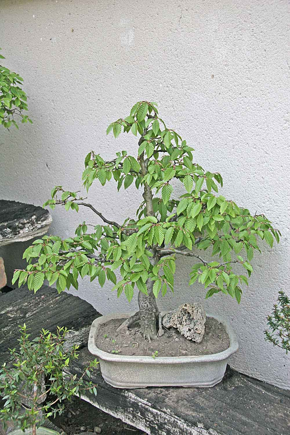 Bonsai_-_carpinus_betulus autor: Prazak